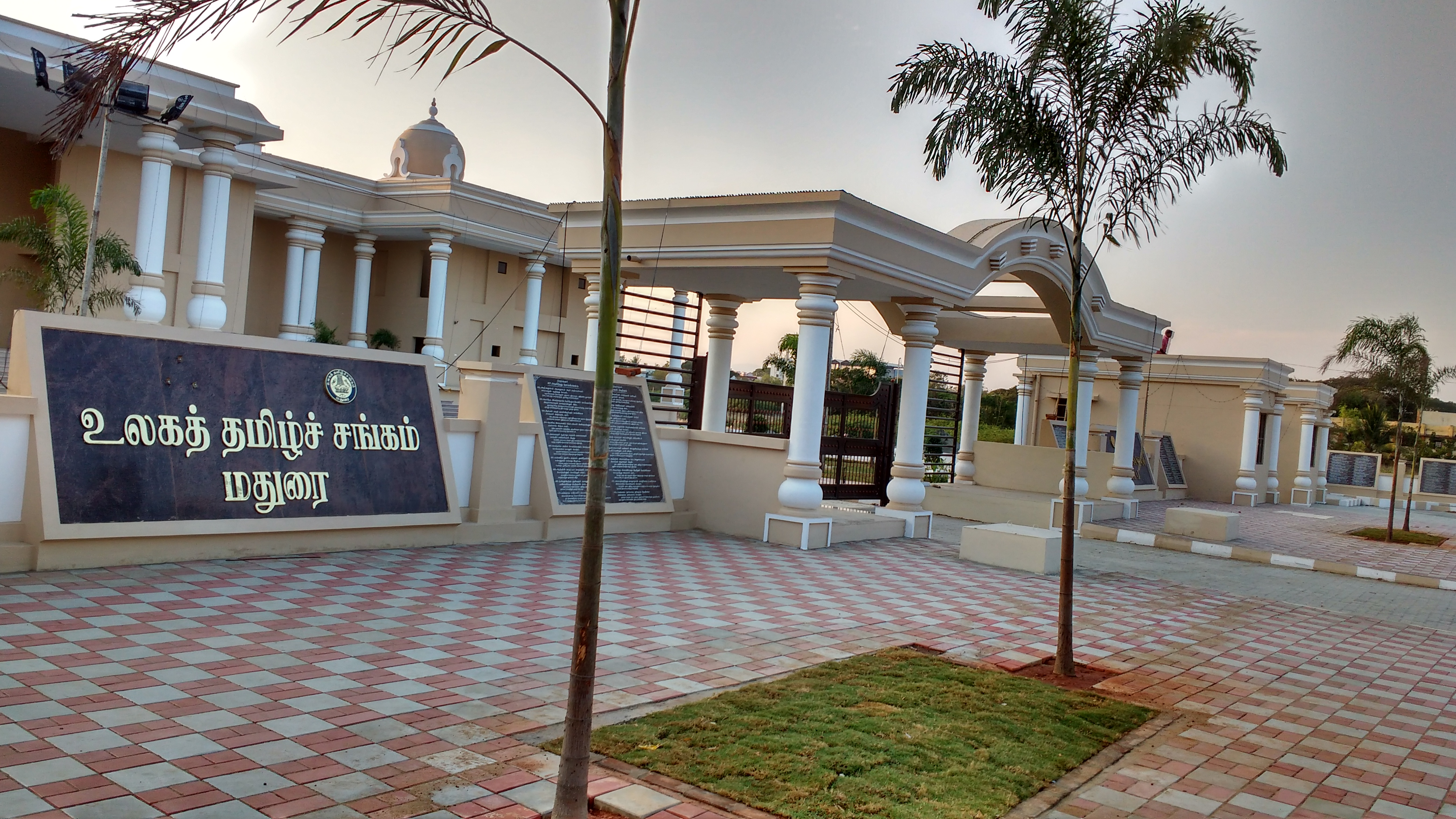 World Tamil Sangam Complex, Madurai